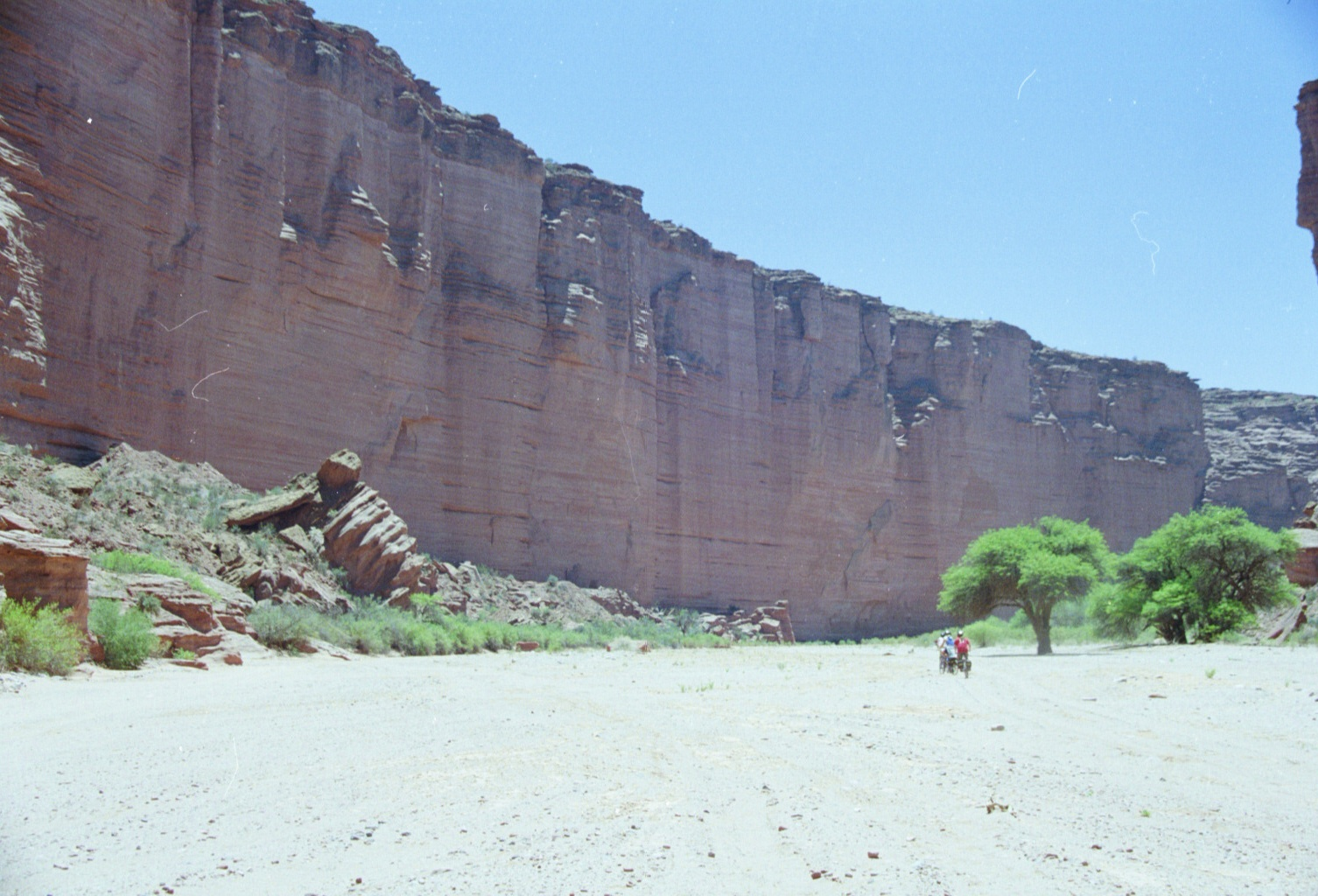 Nationalpark Talampaya